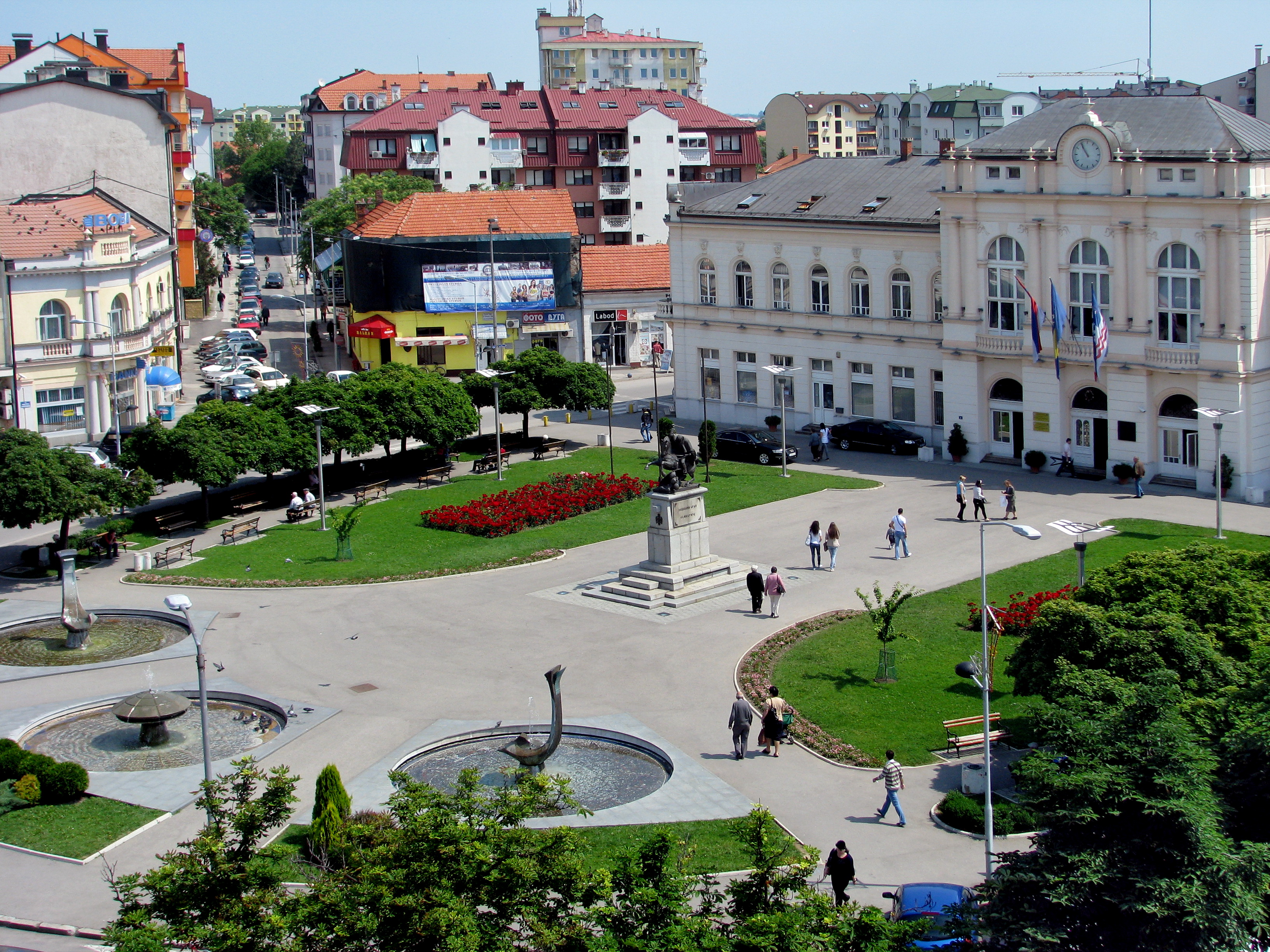 Вијећница, Бијељина ID добра: NKD211